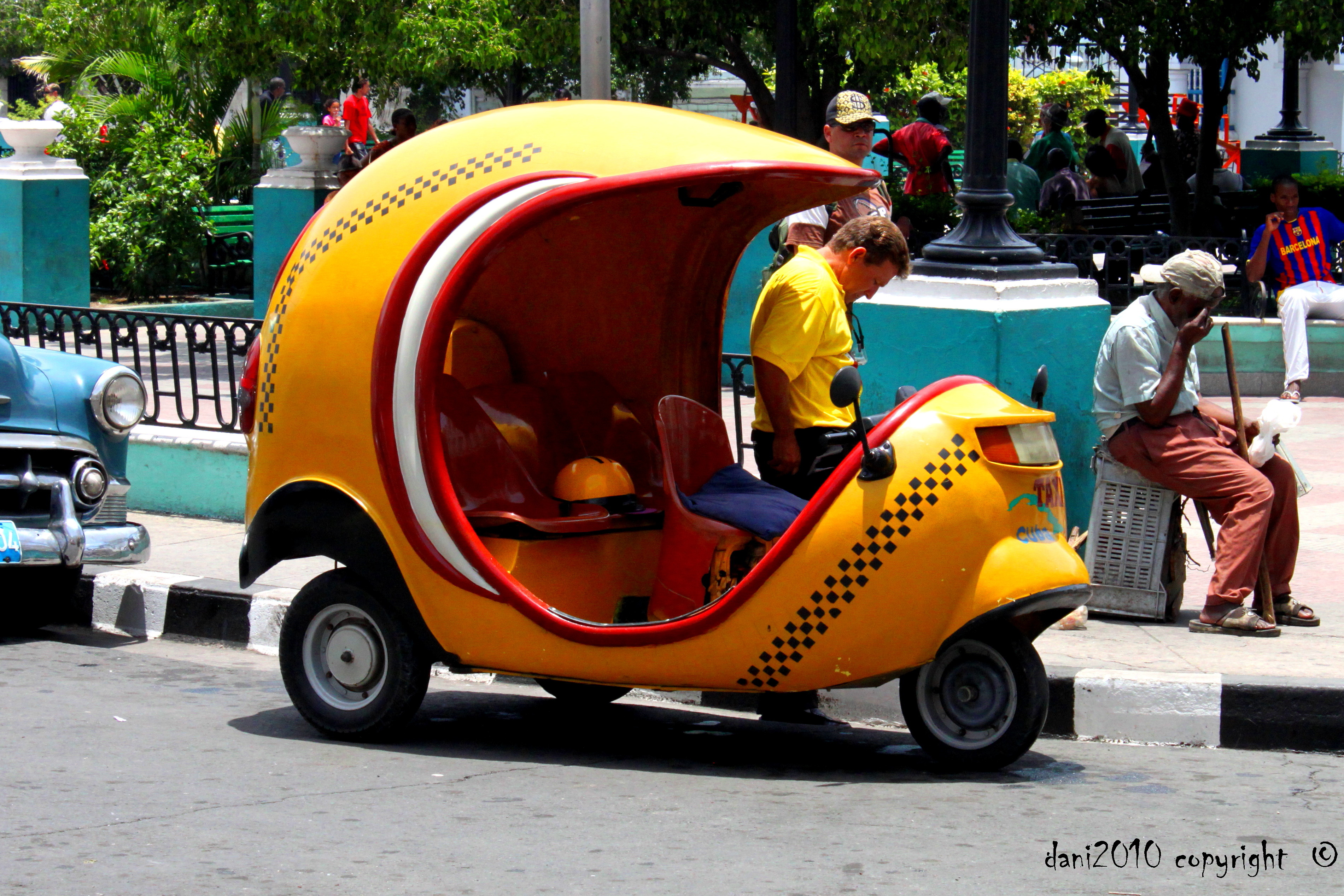 Arrasando las lomas santiagueras, ¡aí va otro Coco-Taxi!